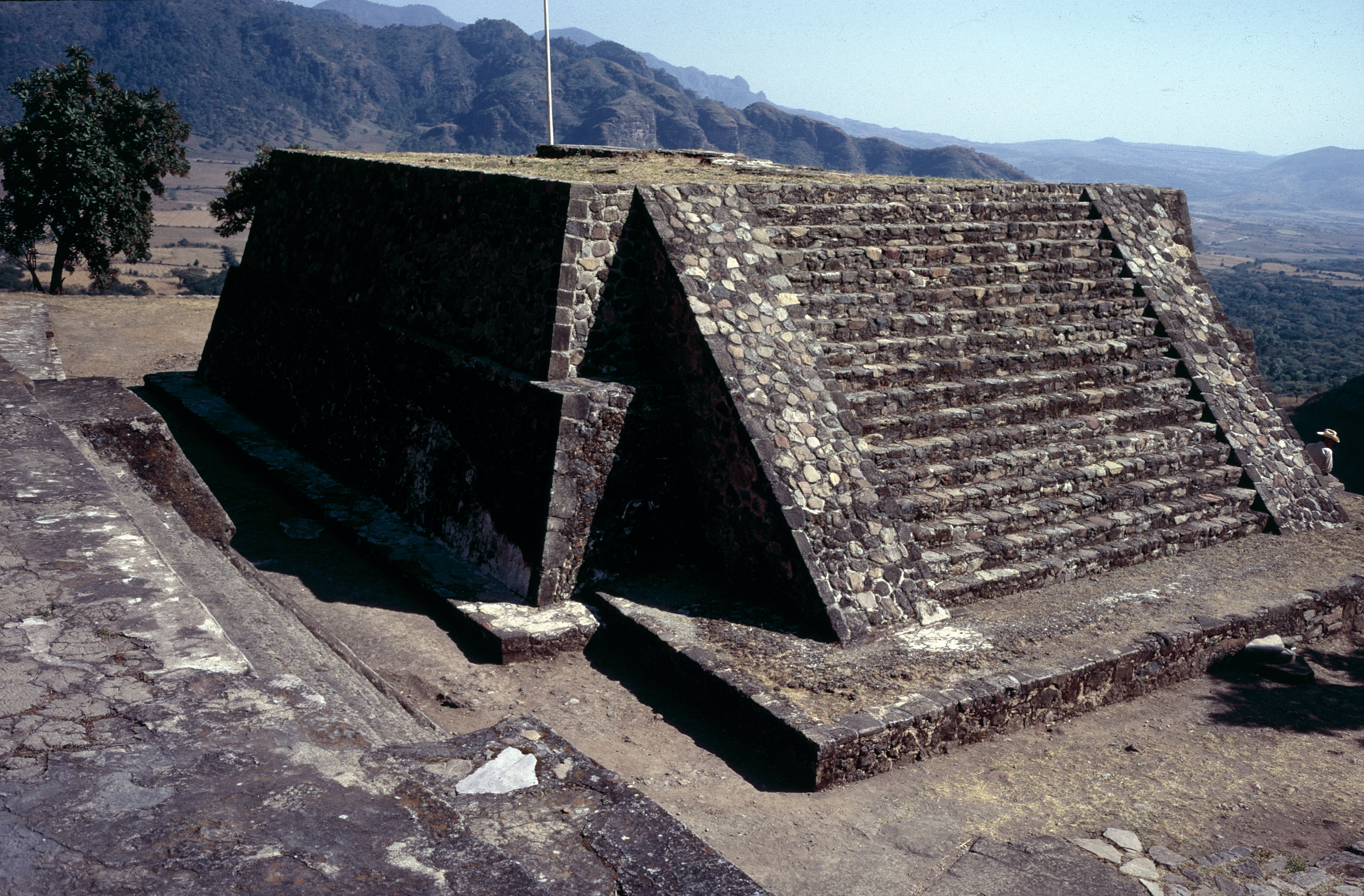 Malinalco, Estado de México, Mexiko: Monument 2